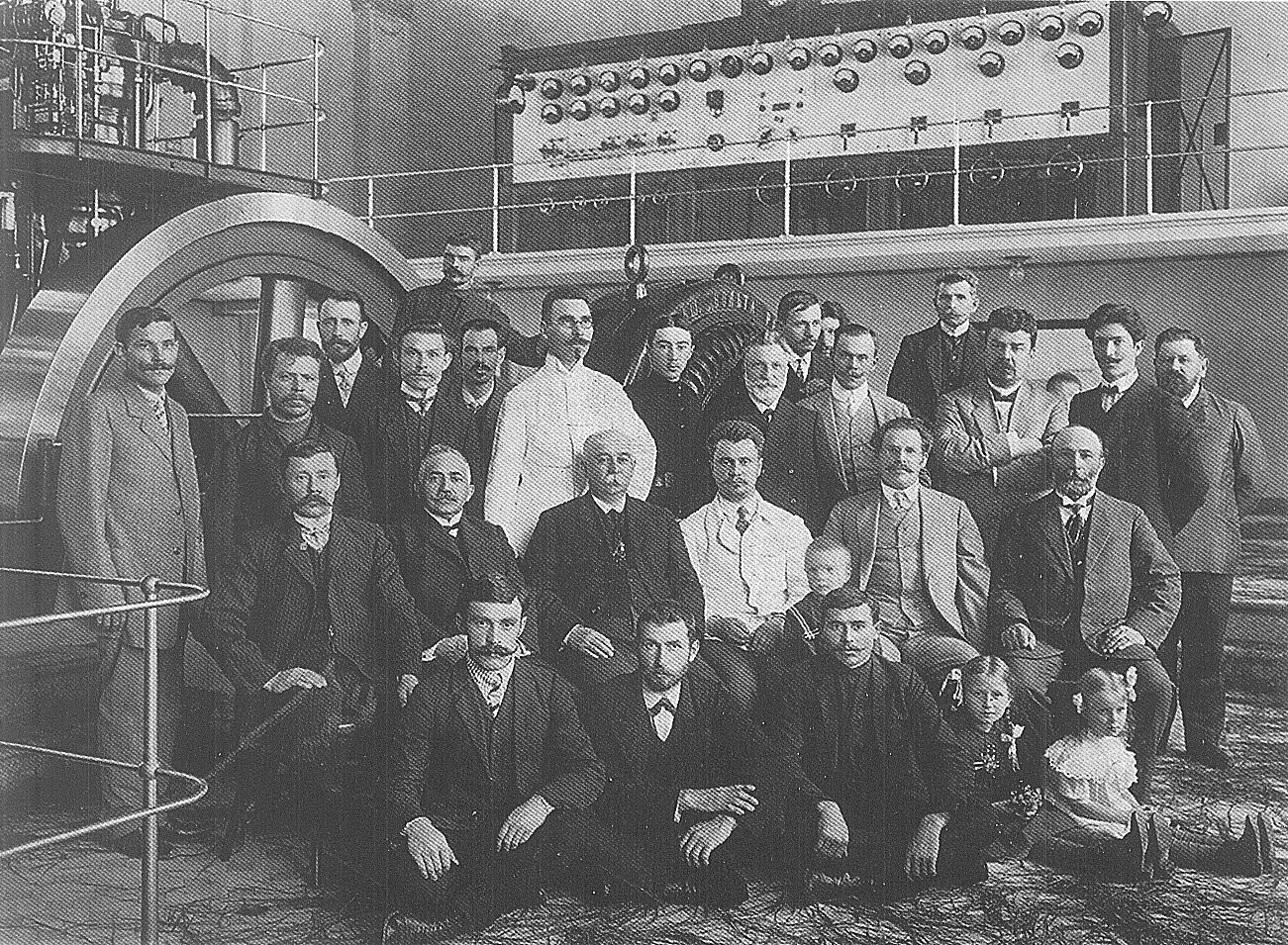 «Зал астраханской электростанции» (во втором ряду третий слева - С.И. Франгулов, в третьем ряду третий справа — Н.Ф. Скориков, оба гласные городской Думы).